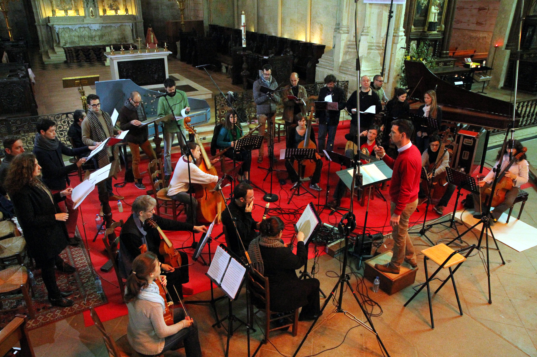 Les Chantres de Saint Hilaire, Concerts Vivaldi, Sauternes, St Martin de Sescas, 26 et 27 mai 2012, Iza.Pauly (c)